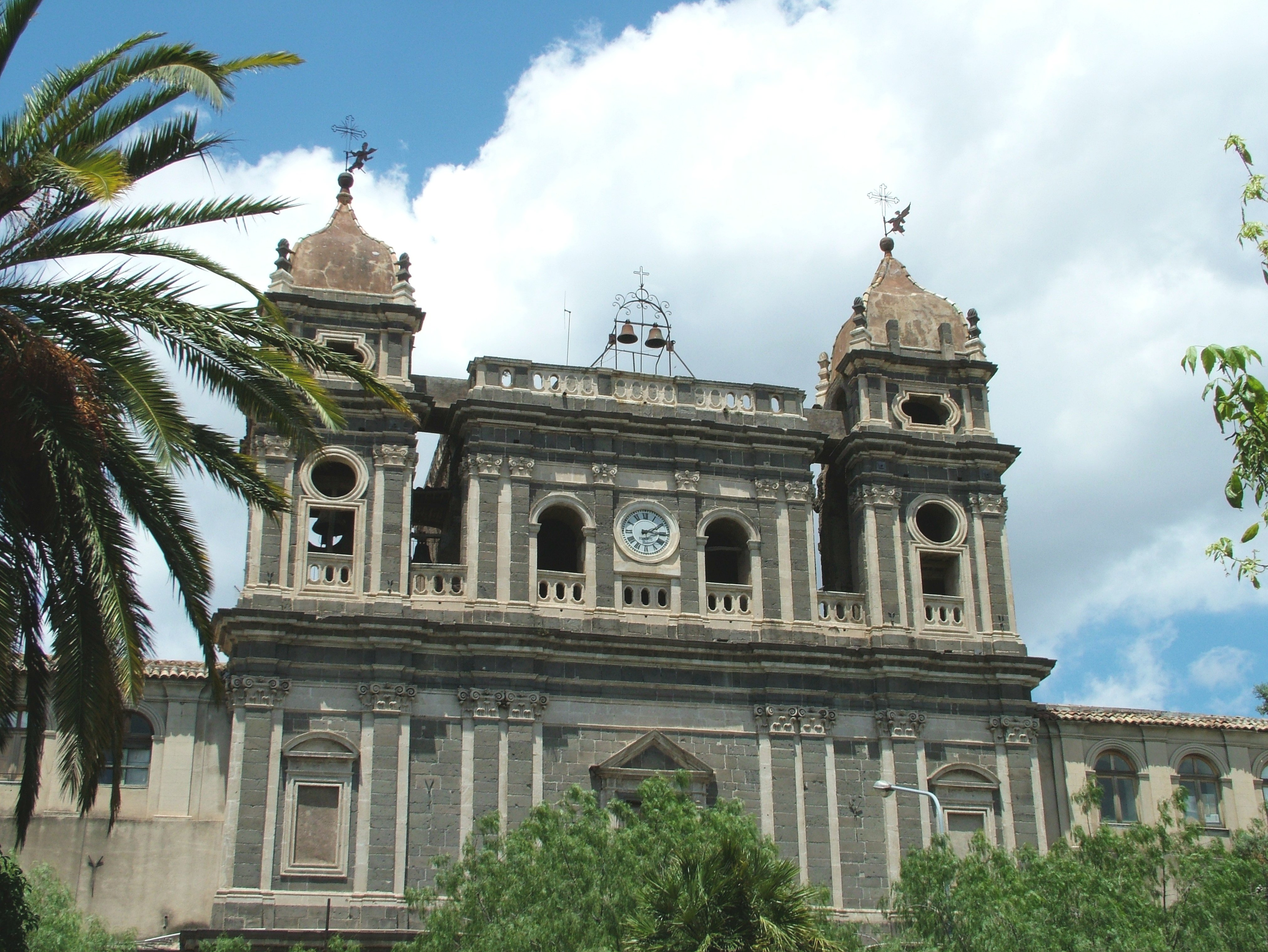 Adrano, Sizilien, Monastero Santa Lucia